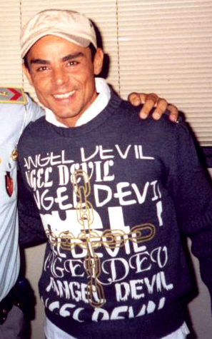 Foto con Benigno